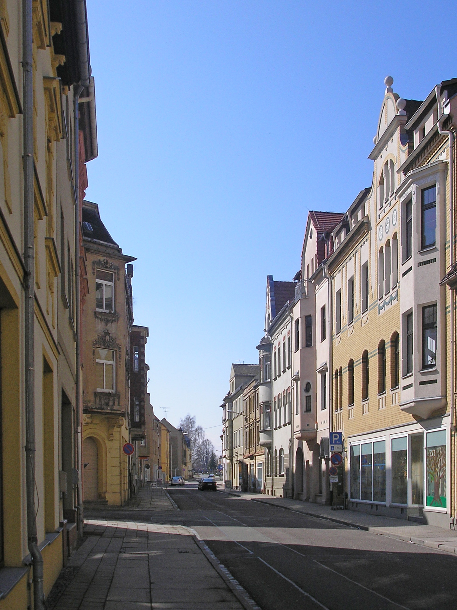 Die Bahnhofstraße in Meuselwitz (Thüringen).